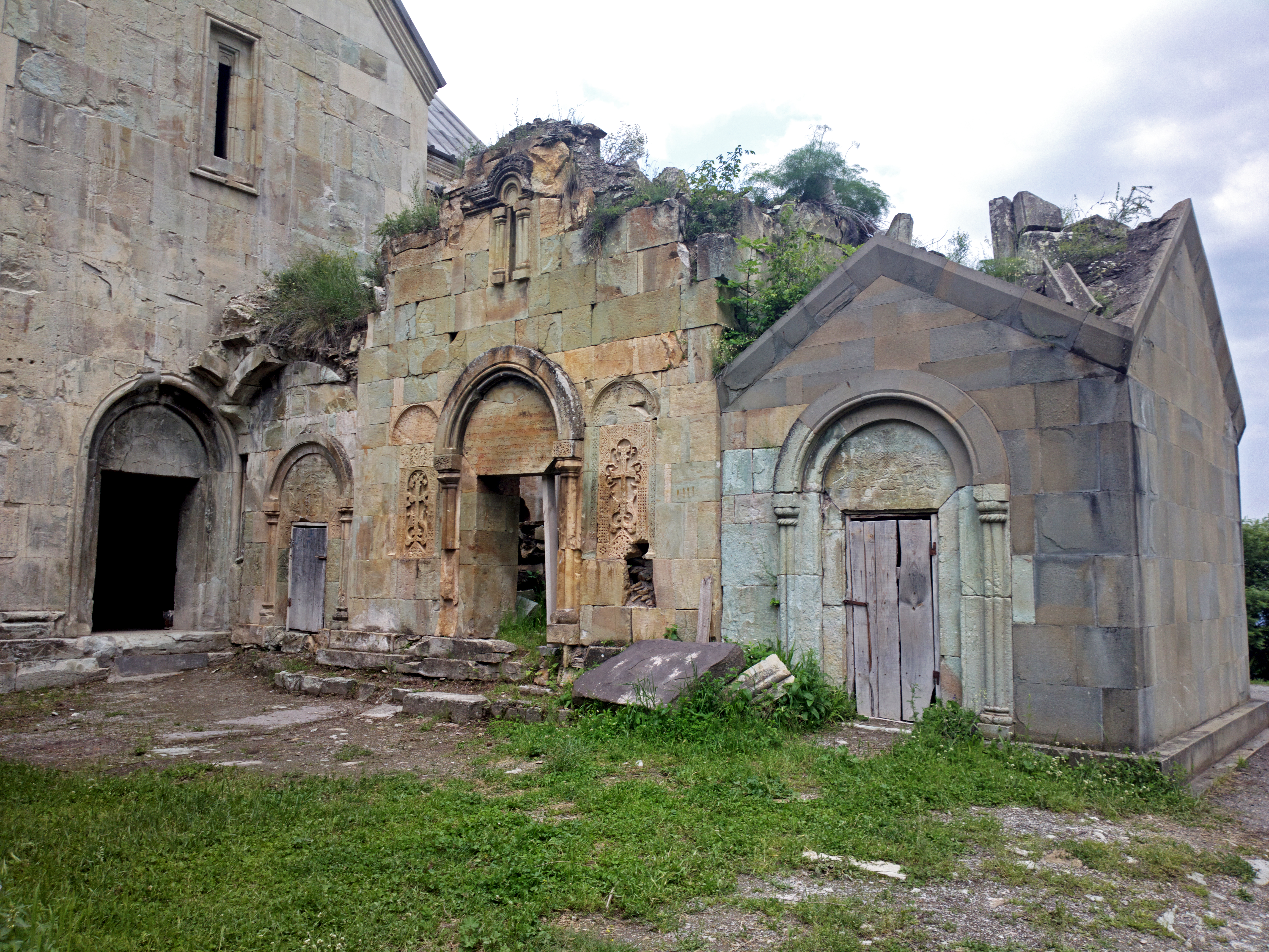 Վանական Համալիր Նոր Վարագավանք (Անապատ) 60/10